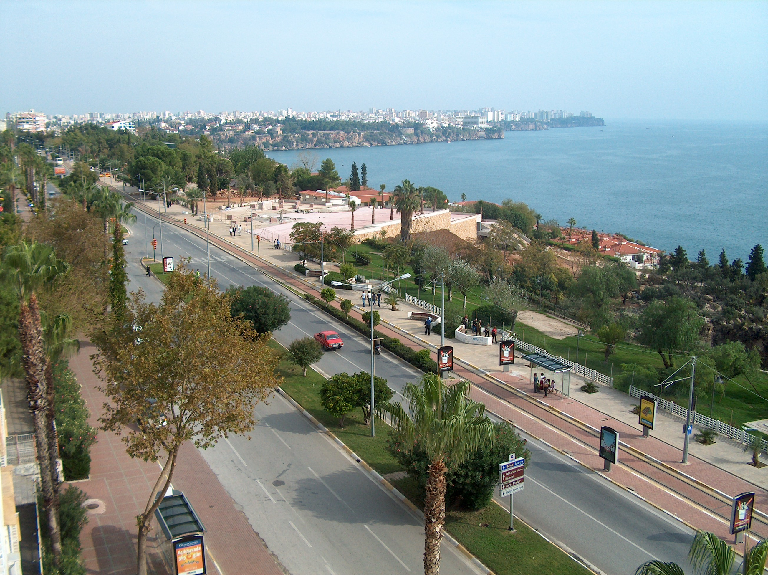 Konyaalti street, Antalya, Turkey